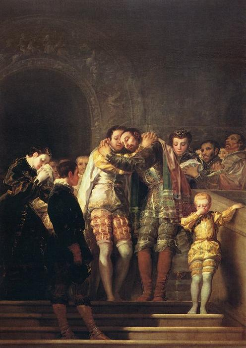 San Francisco de Borja says goodbye to his family San Francisco de Borja despidiéndose de sus familiares en su palacio de Gandía para ingresar en la compañía de Jesús, óleo de Francisco de Goya. Pintado en el año 1788. Capilla de San Francisco de Borja - Valencia